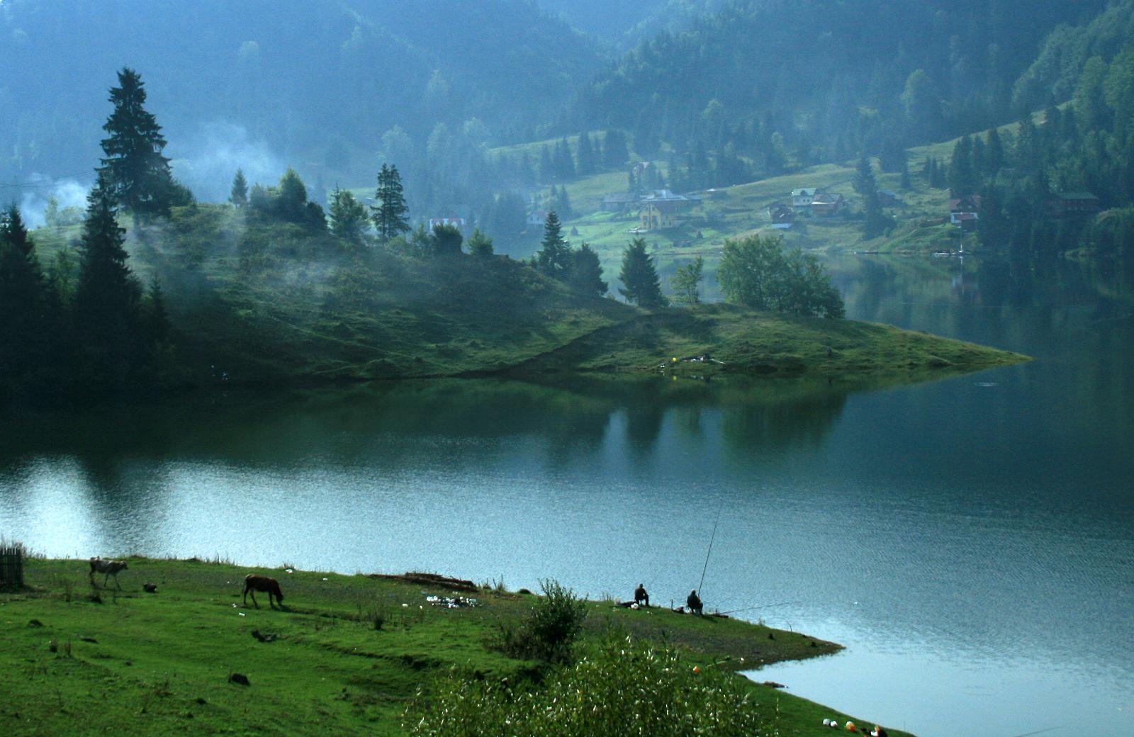 Colibița Lake, Bistrița-Năsăud, Romania